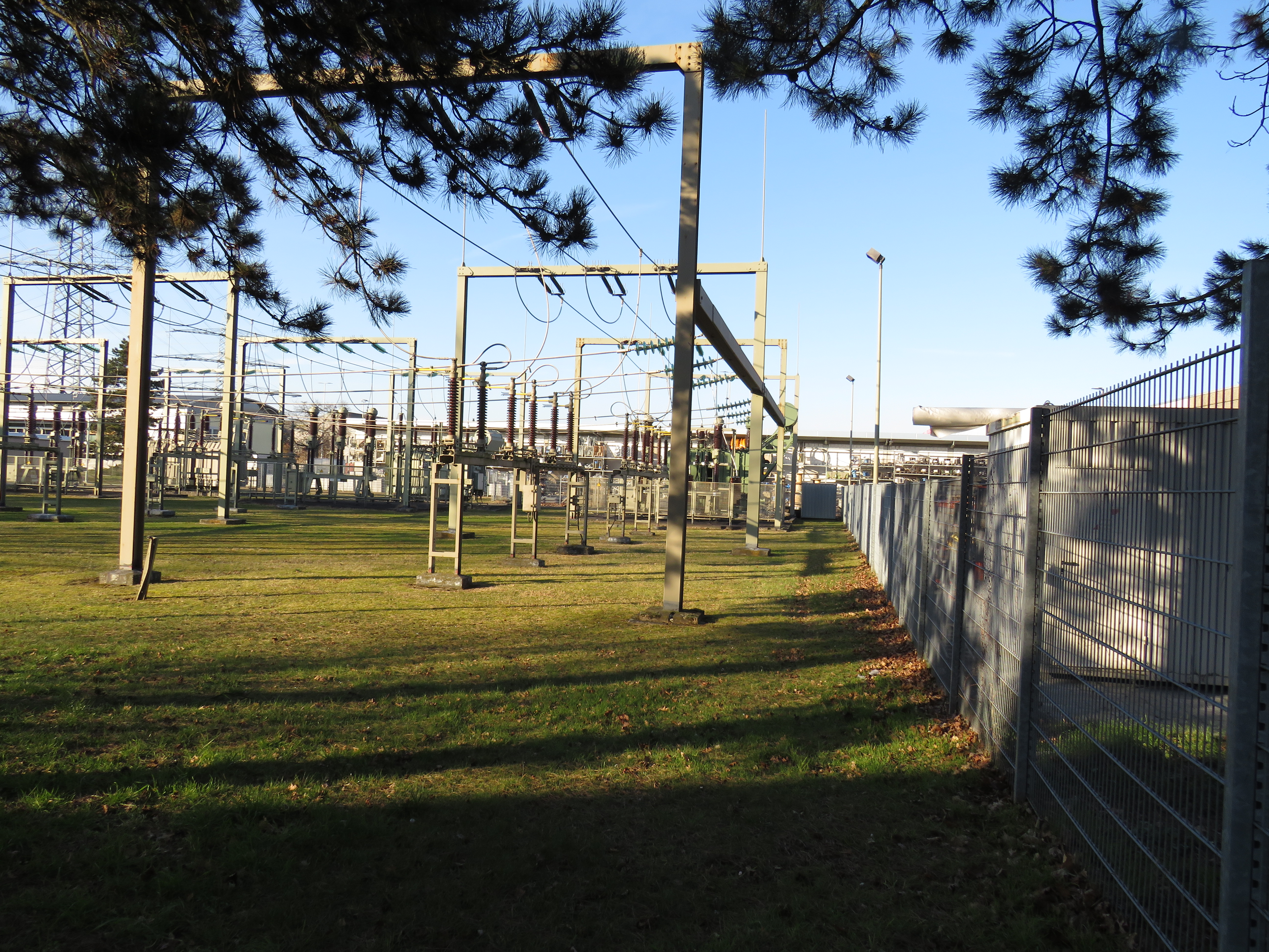 110-kV-Schaltanlage des UW Darmstadt